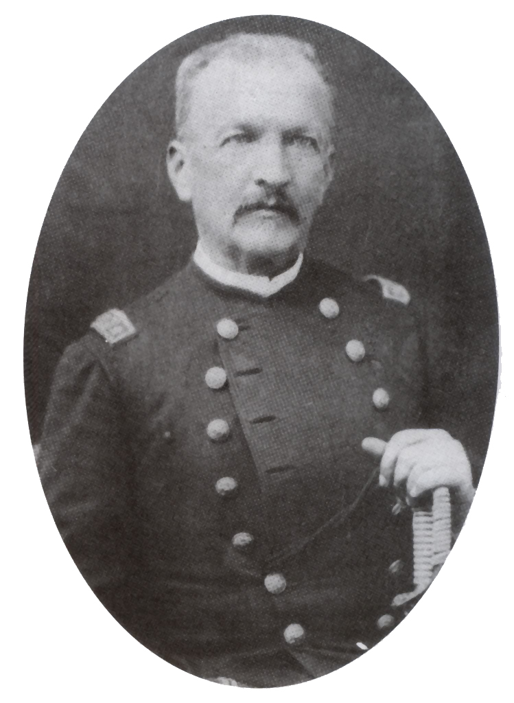 Manuel Baquedano (1823-1897), militar y presidente chileno, comandante en jefe del Ejército durante la Guerra del Pacífico.